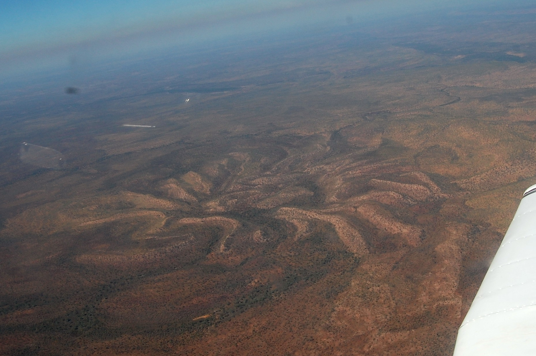 Von Westen aus fotografiert.